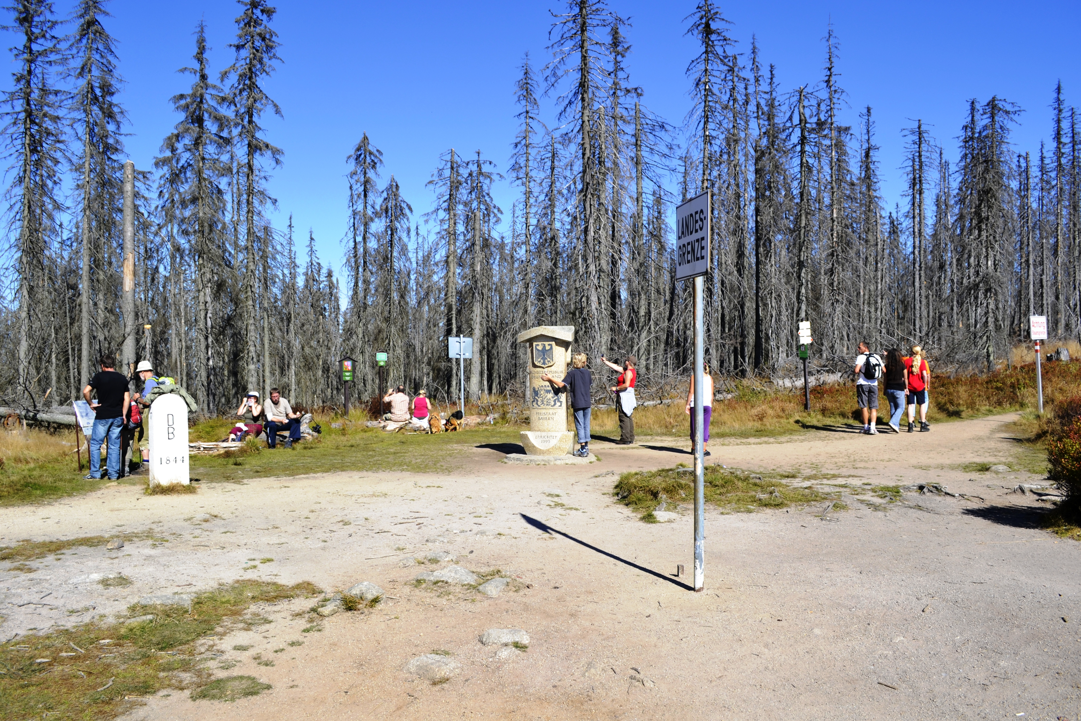 Touristen am Dreiländereck Tschechische Republik-Österreich-Deutschland auf dem Dreisesselbergkamm.